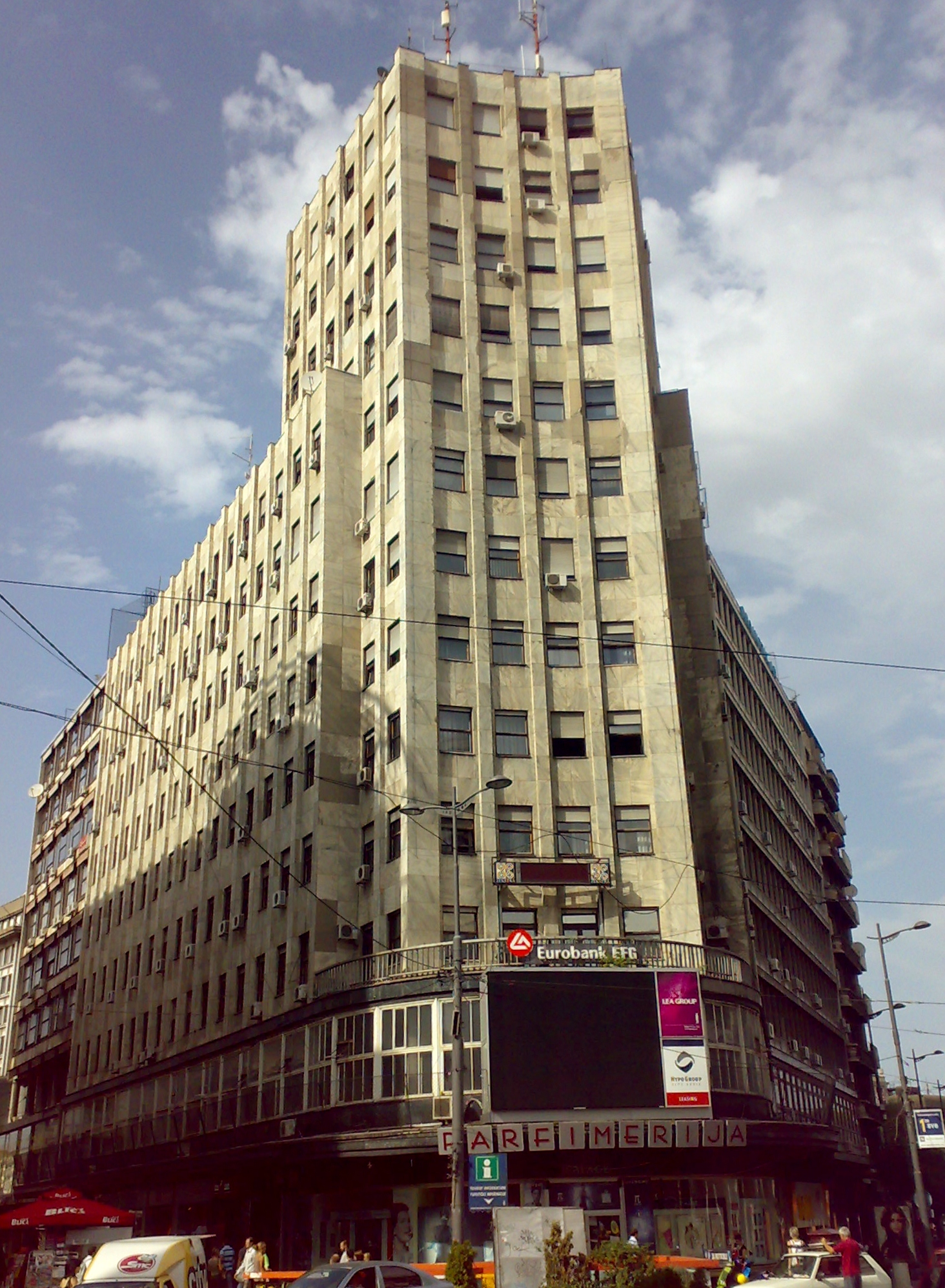 Albania palace, central beograd, Serbia